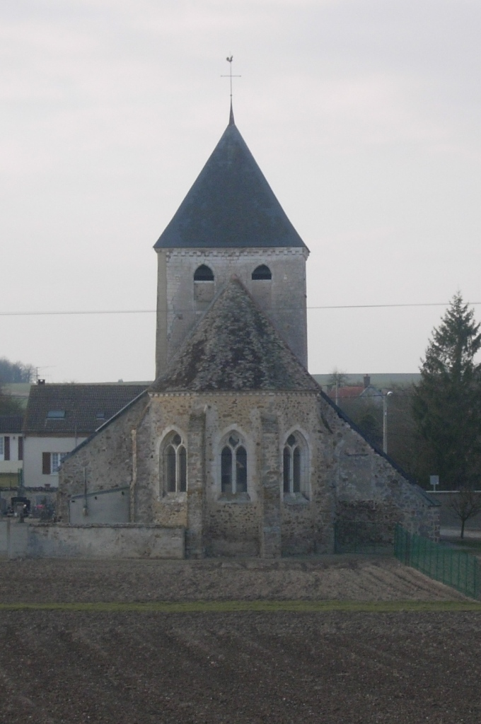 Avon-la-Pèze, église